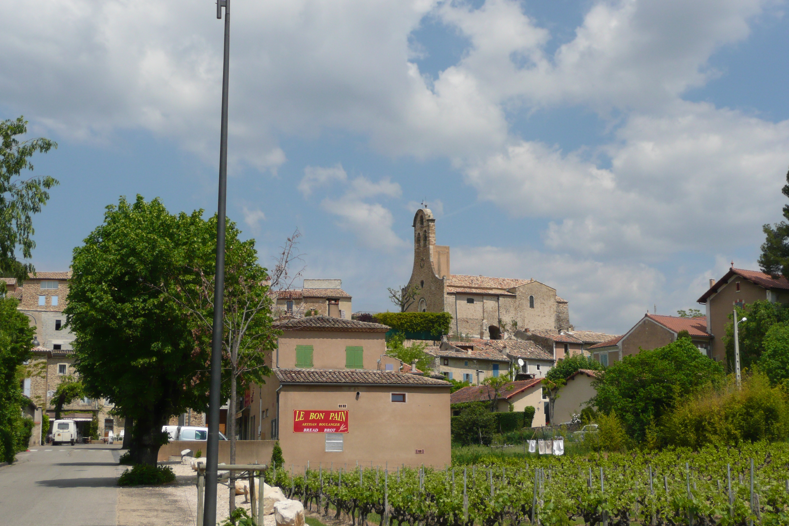 Puyméras.